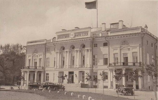 Здание Президиума Академии наук СССР